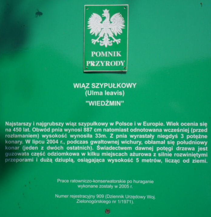 Wiąz szypułkowy.